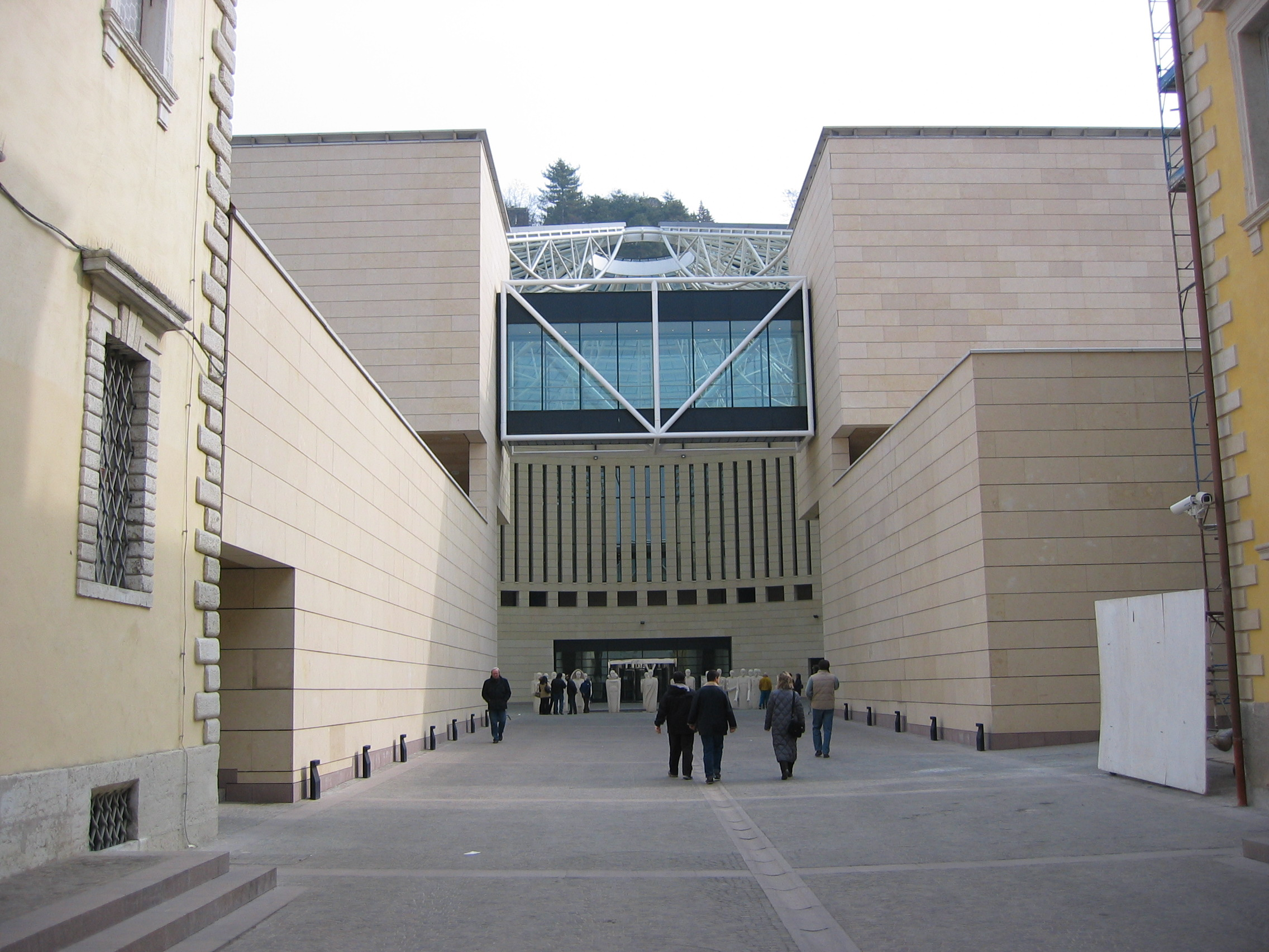 Rovereto: ingresso del MART poco dopo la sua inaugurazione.